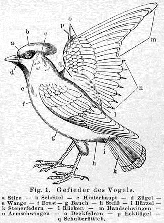 Abbildung aus Meyers Konversationslexikon 1888: Körperteile von Vögeln